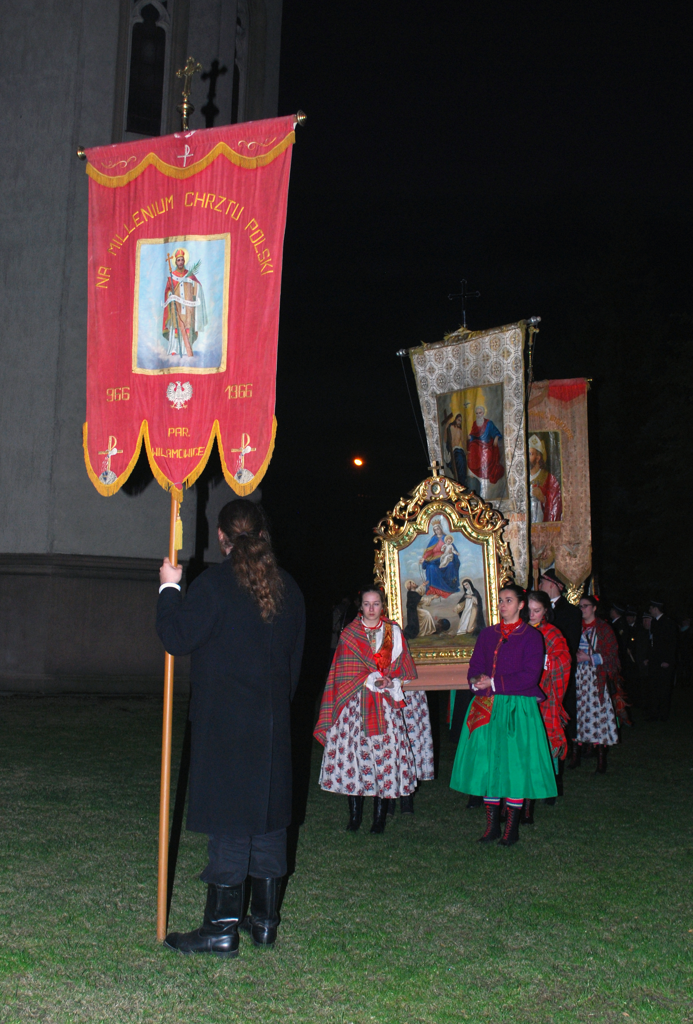 Wigila Paschalna w Wilamowicach - procesja